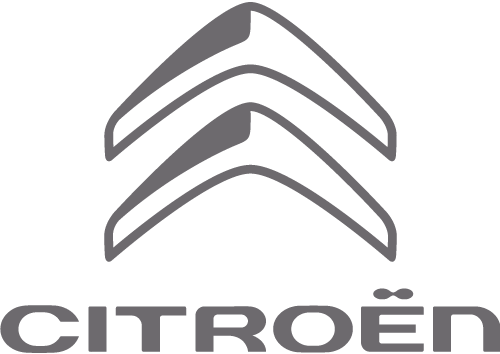 Citroen logo